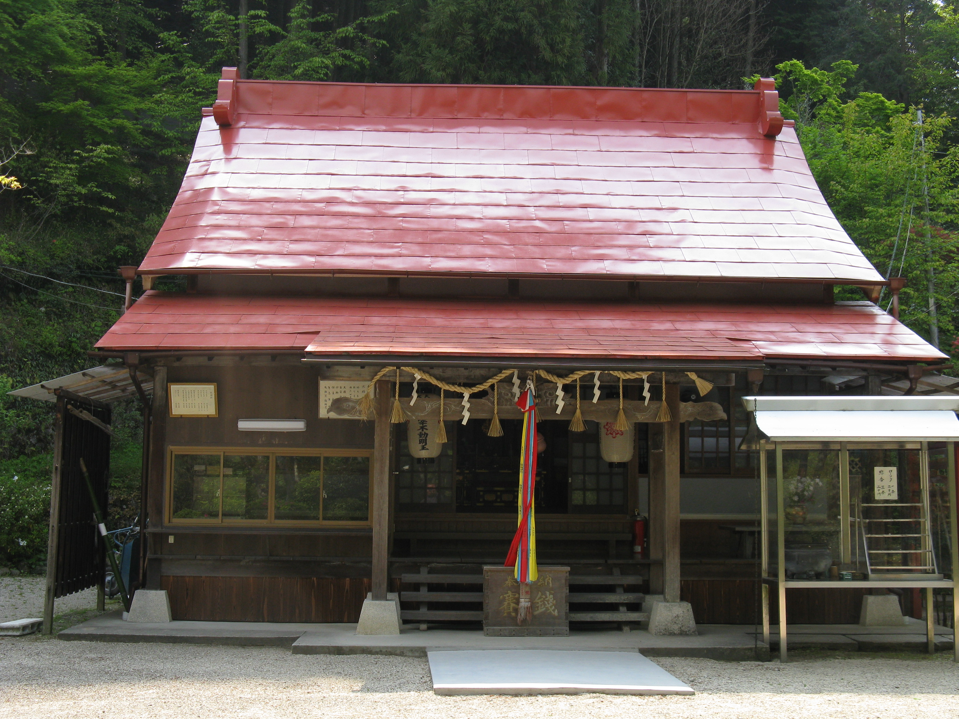 勝光寺 本堂